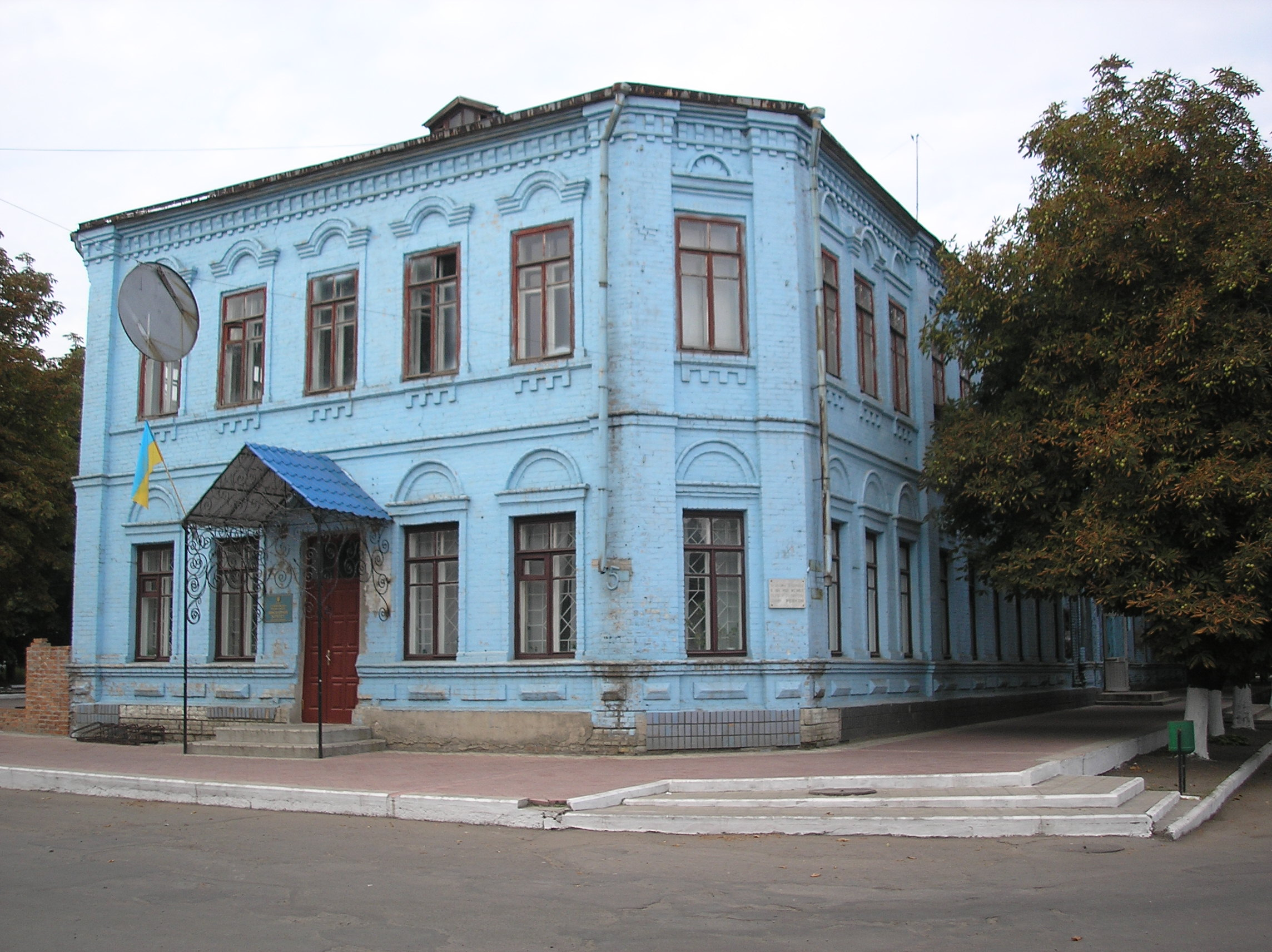 Земська управа, Гуляйполе, вул. Шевченка, 15